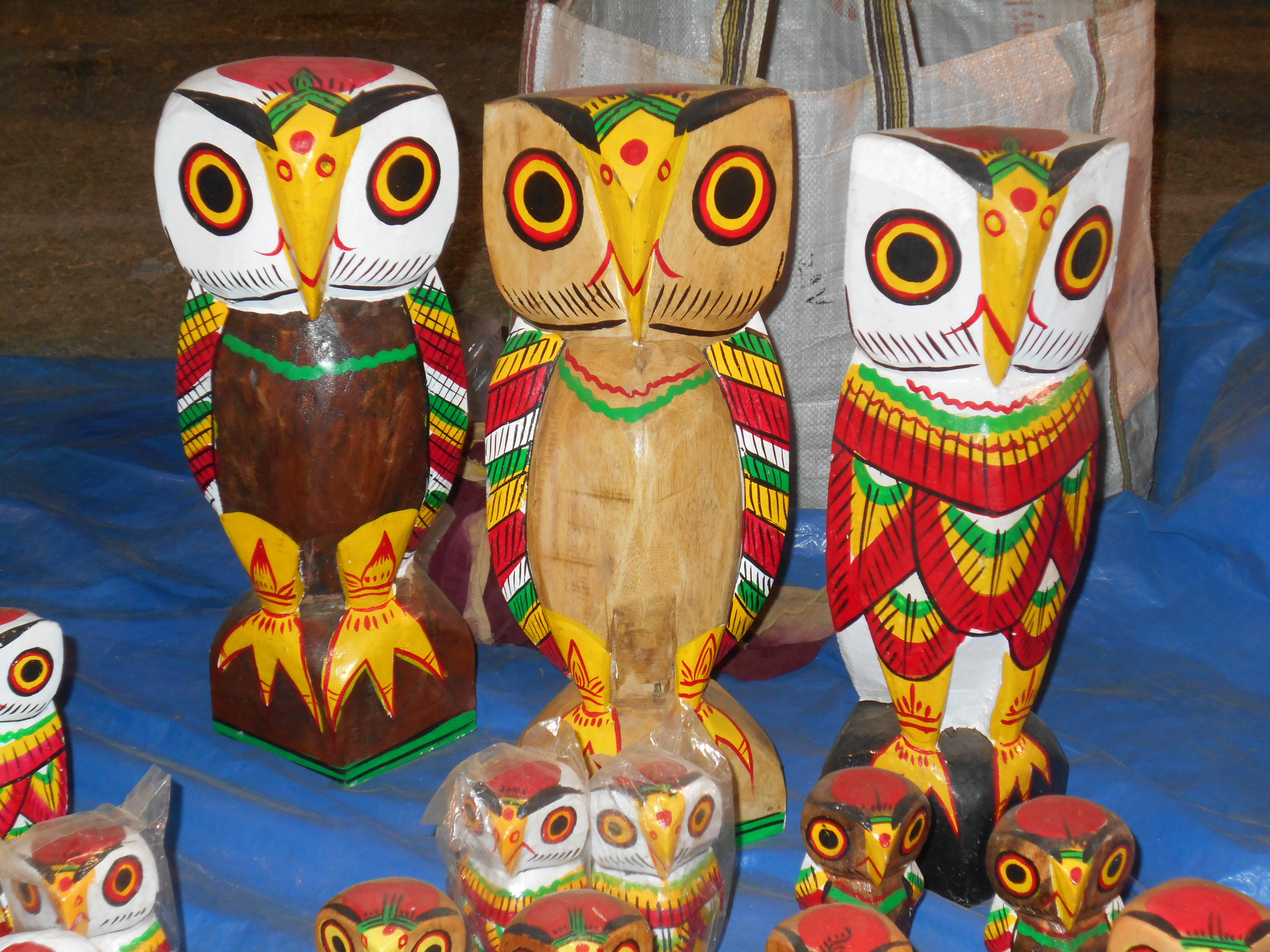 নতুনগ্রামের কাঠের পেঁচা